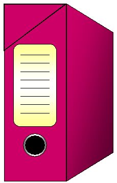 Dossier de classement de couleur prune pour archivage